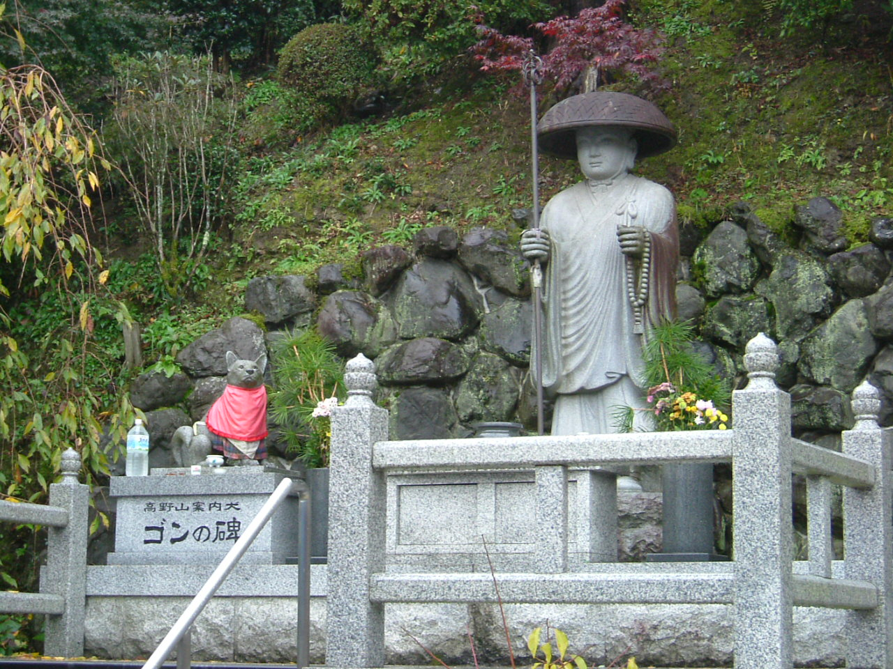 弘法大師と案内犬ゴンの像（和歌山県九度山町慈尊院）